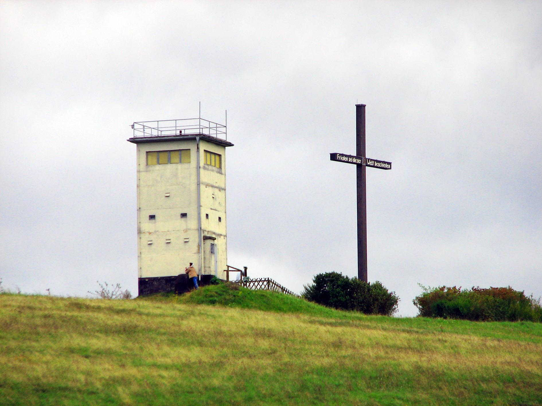 Weltfriedenskreuz und DDR Wachturm bei Hermannsfeld